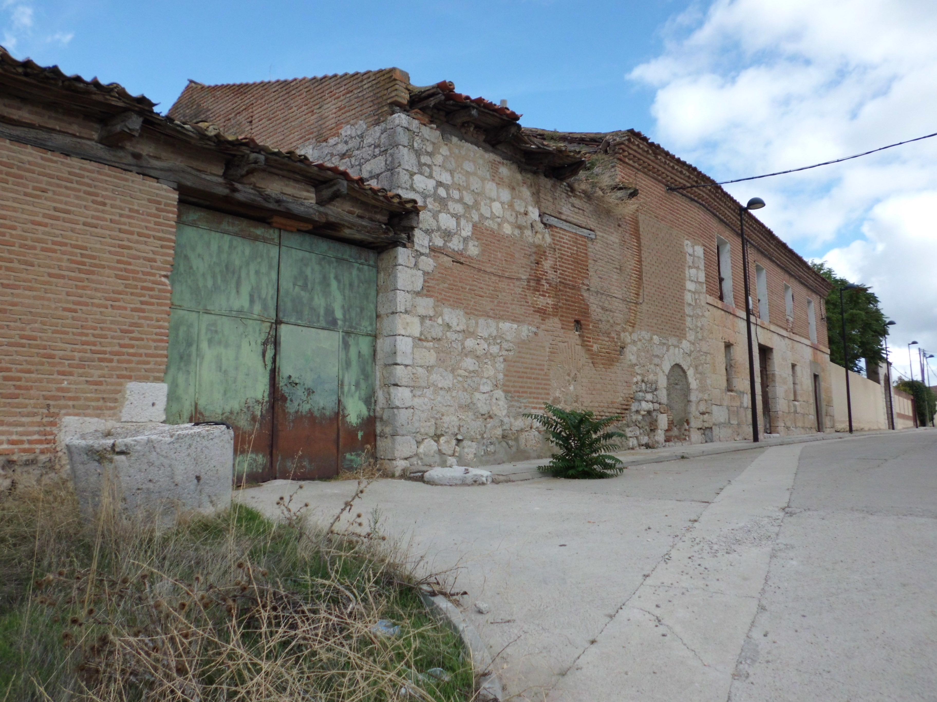 Esta casa se encuentra en Villanueva de Duero, provincia de Valladolid, España. Perteneció a la Cartuja de Aniago.